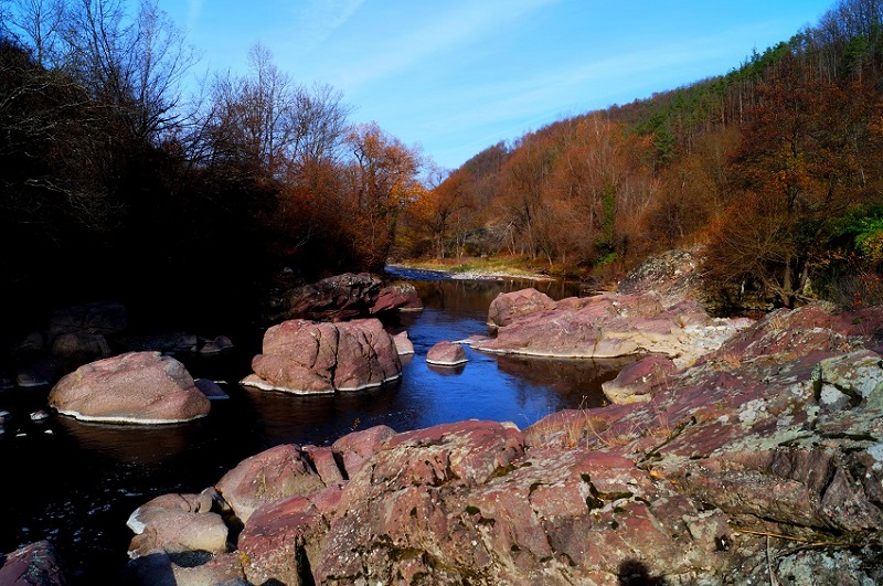 Централен Балкан, Стара планина